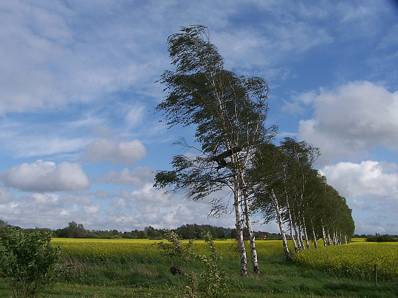 Feldmark am westlichen Stadtrand von Rostock. Für den Schutz der Obstplantagen wurden landschaftsprägende Birken- und Pappelreihen angepflanzt